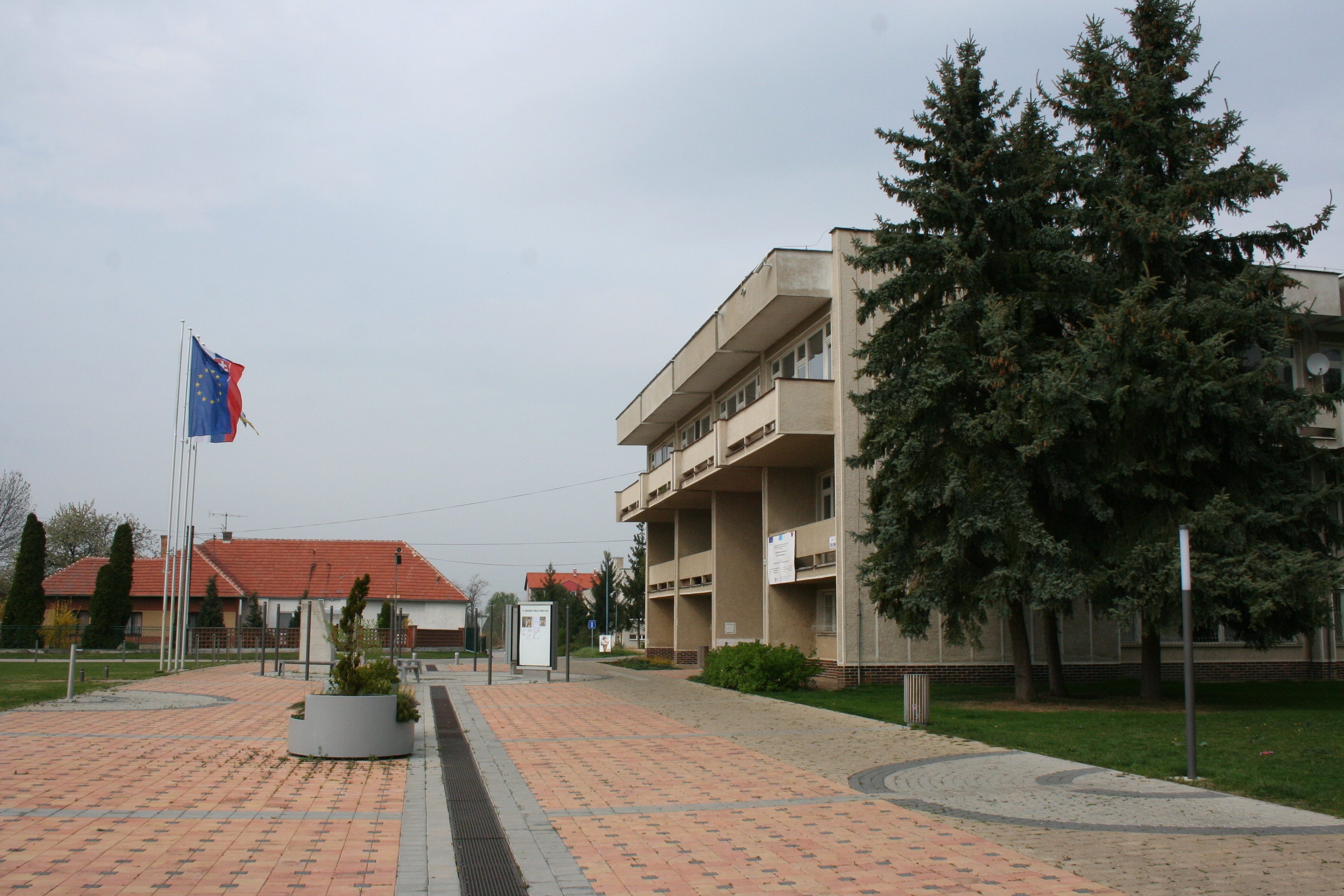 Hull falu